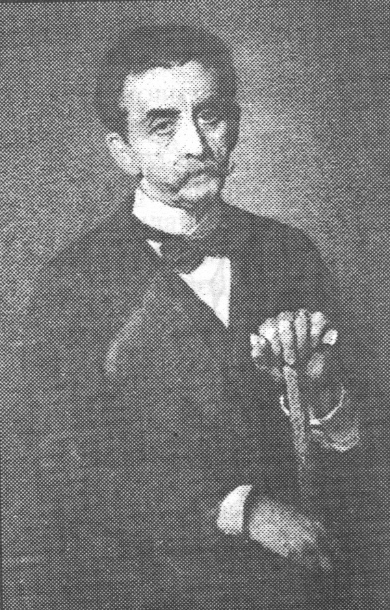 Борис Сергеевич Шереметев (1822-1906) - композитор из рода Шереметевых.